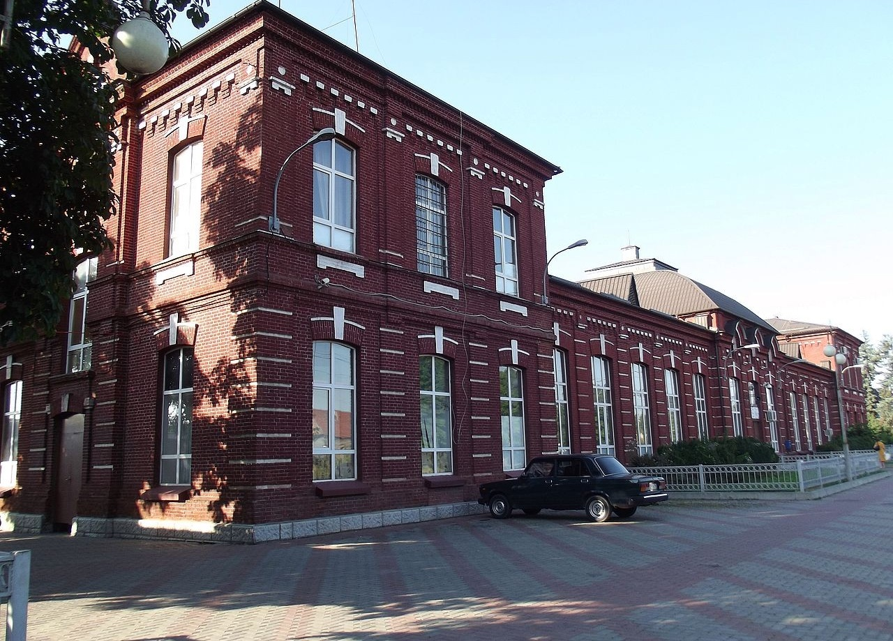 Железнодорожный вокзал станции Беслан